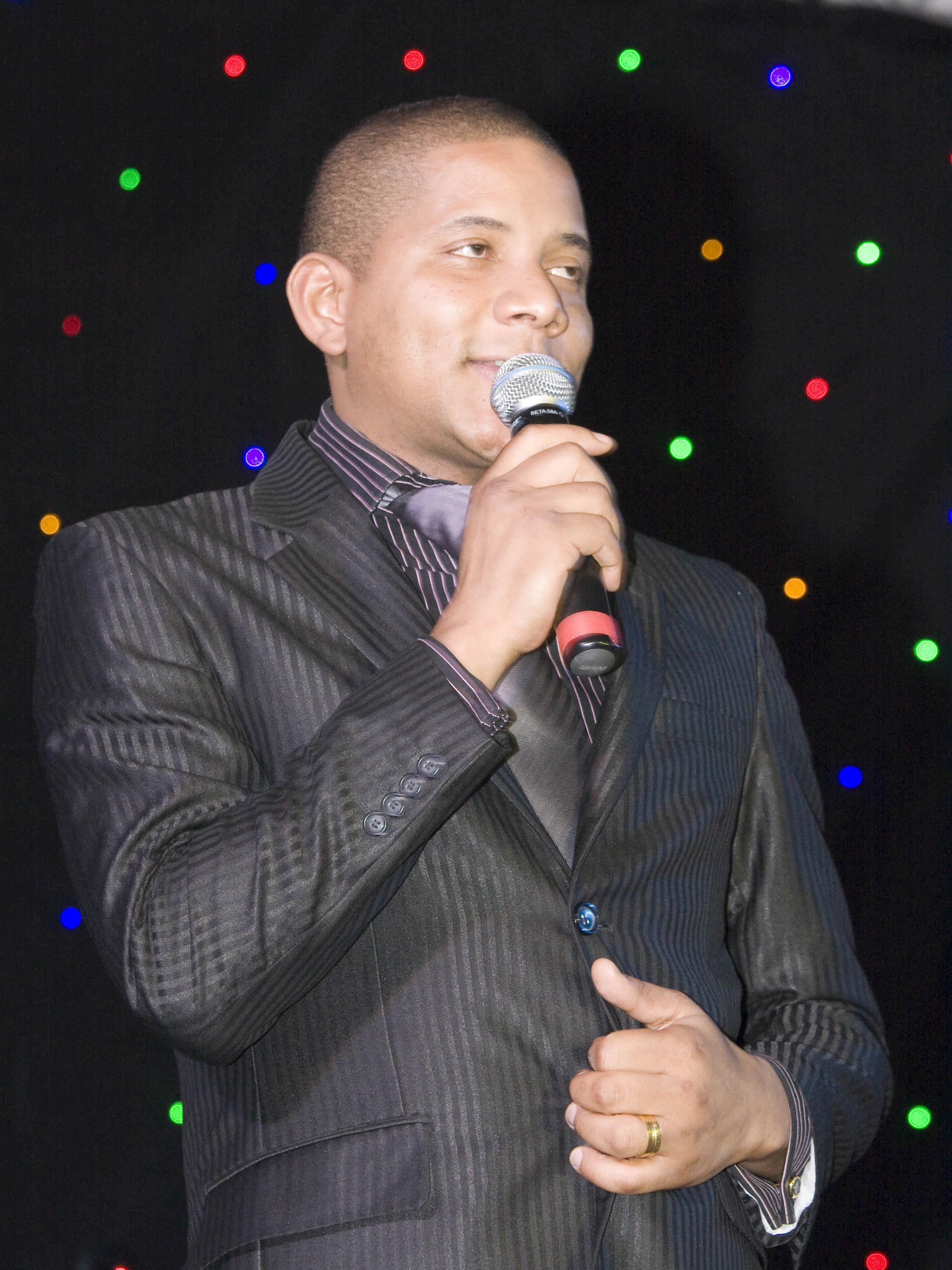 Pedro N'zagi Gala da Build Angola